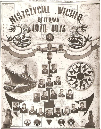 Tablo mojej rezerwy O.R.P. Wicher 1970 r./1973 r.